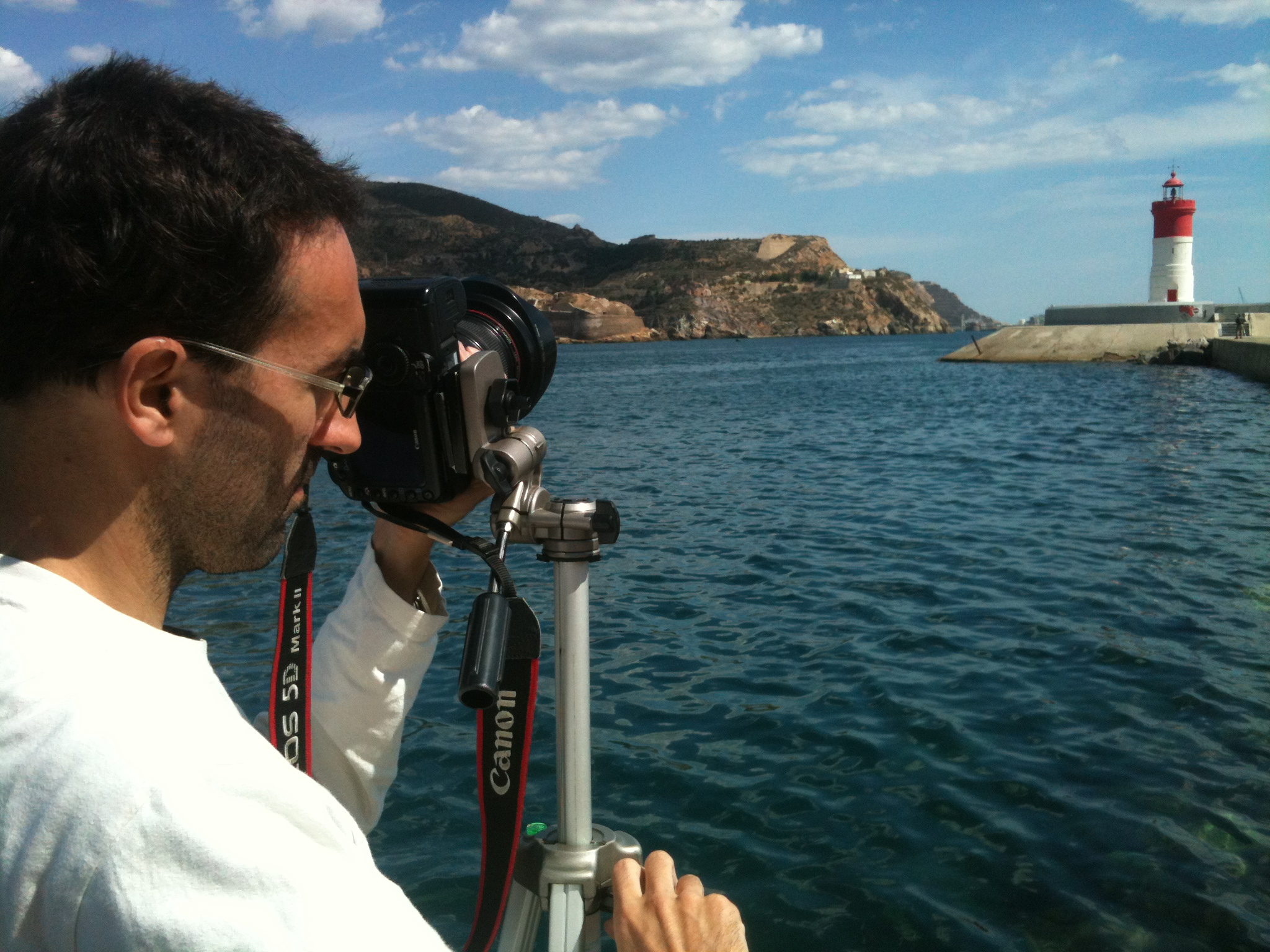 El fotógrafo Asís G. Ayerbe en Cartagena (España), 16 de abril de 2012